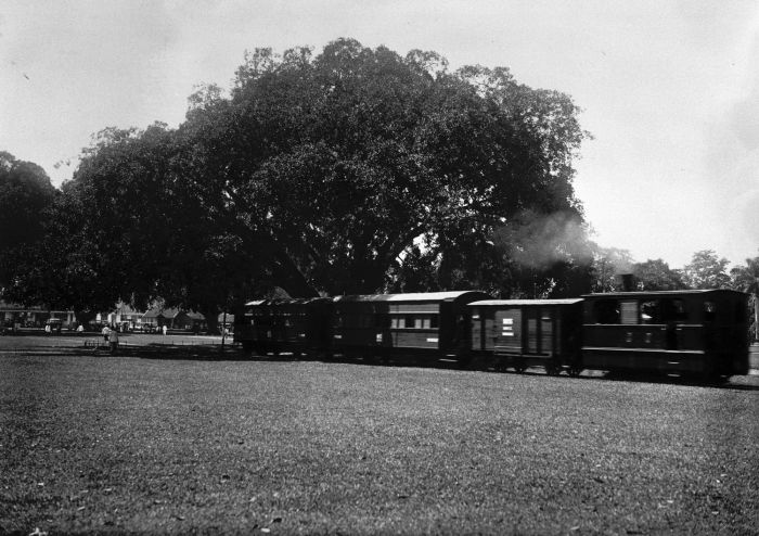 Foto. De stadstram op het aloen-aloen te Malang.